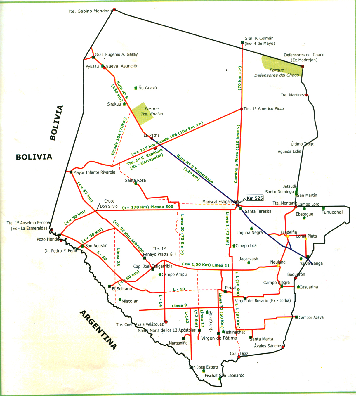 mapa boqueron